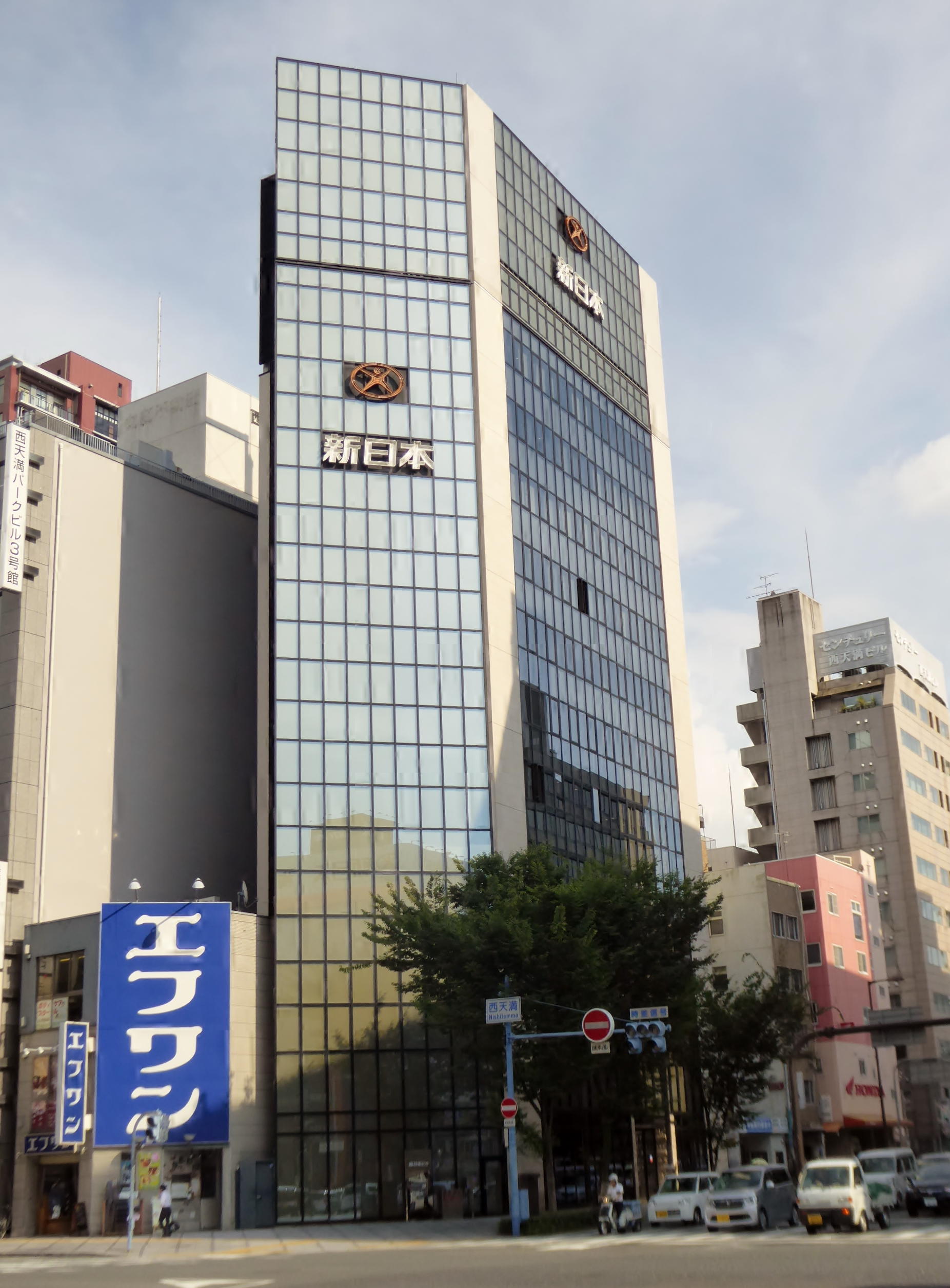 株式会社新日本本社を撮影。